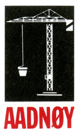 Logo til A/S Jonas Aadnøy